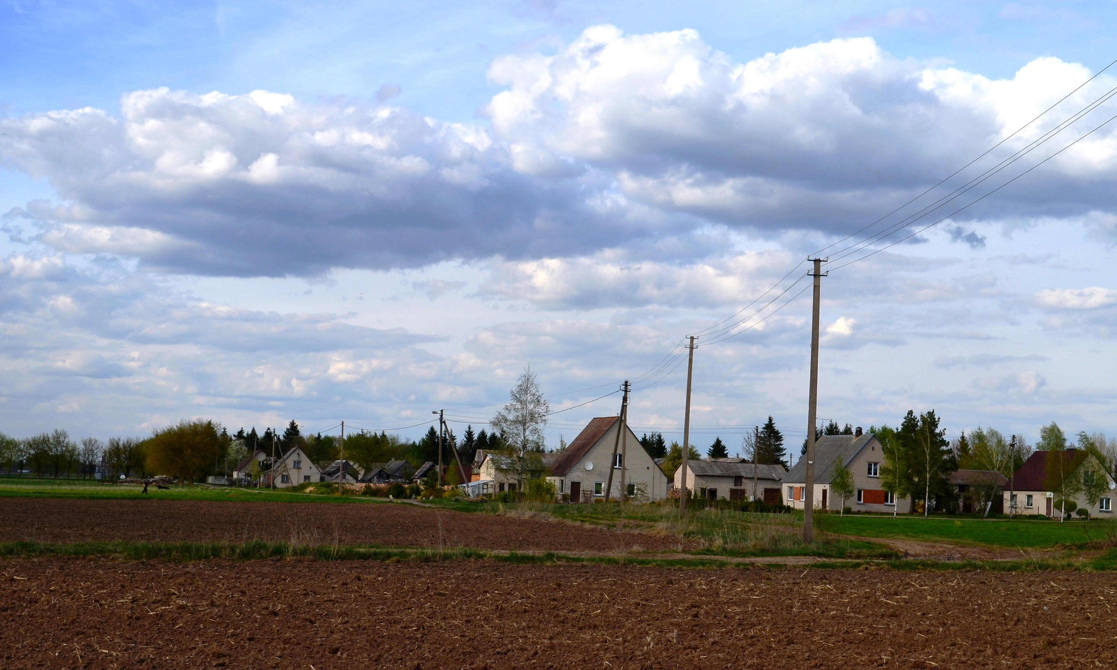 Aukštadvario k., Panevėžio raj.